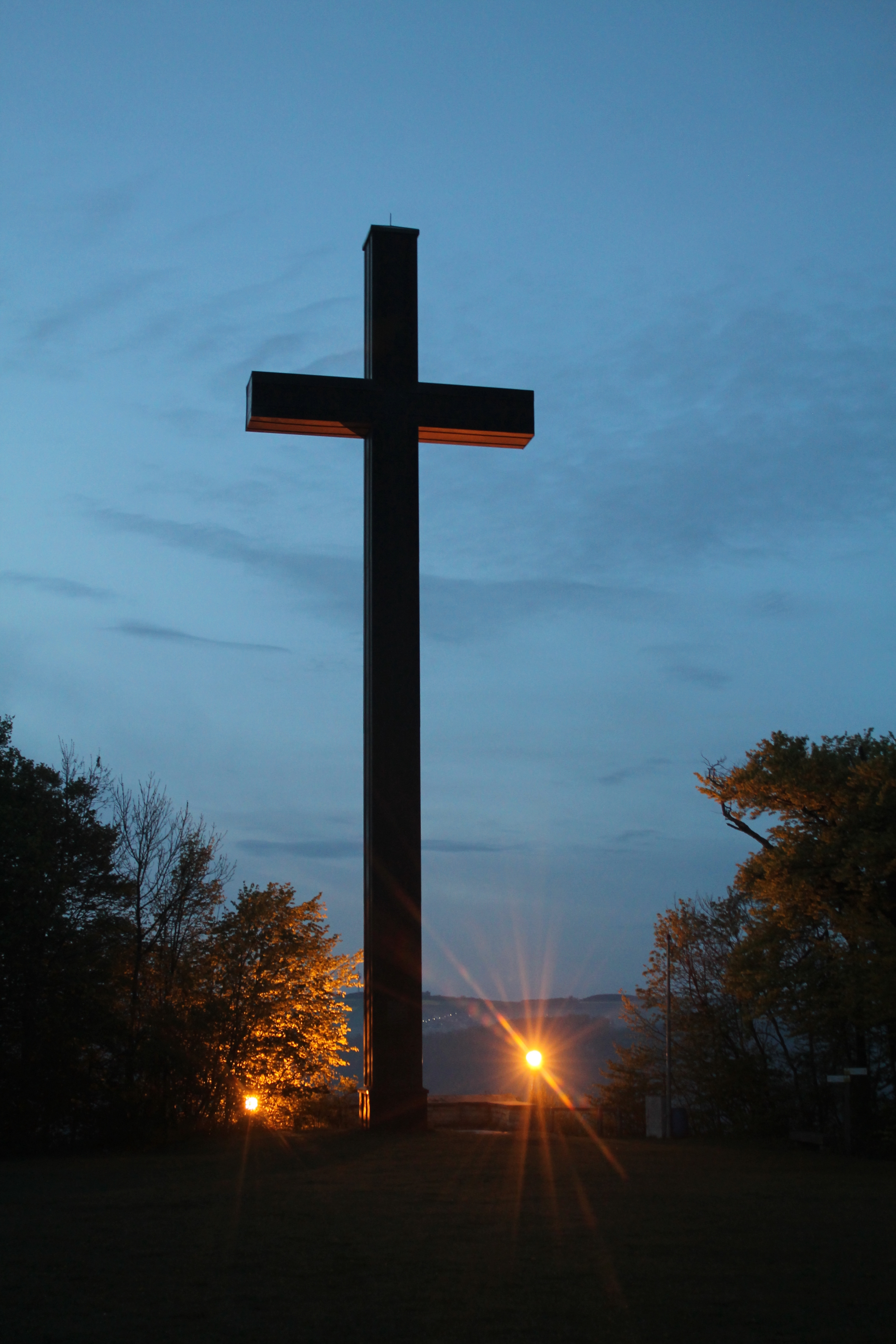 Ostlandkreuz Geislingen in der Abenddämmerung